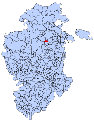 Llano de Bureba en Burgos